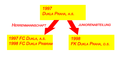 Schematische Darstellung der Aufspaltung Dukla Praha Ende der 1990er Jahre